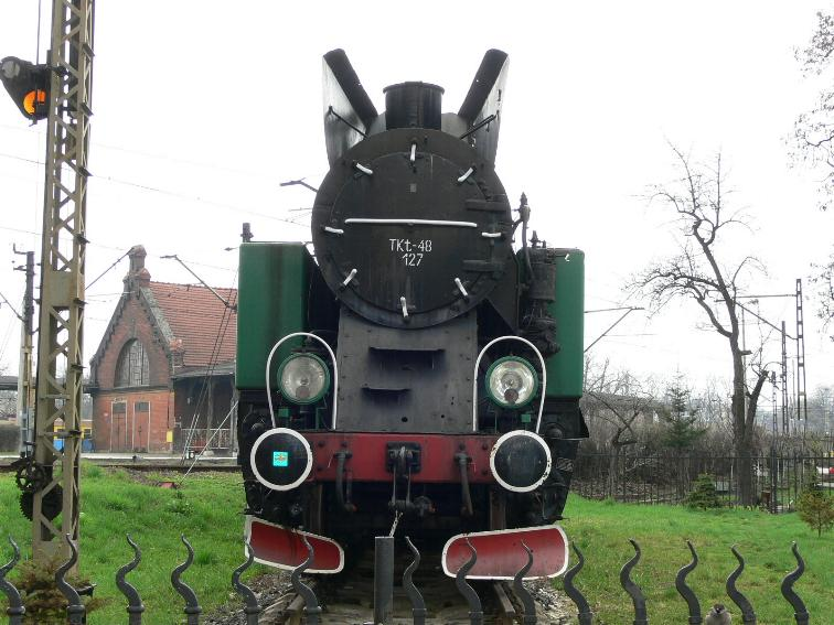 Opole - Lokomotywa TKt48-127 ustawiona jako pomnik przed dworcem głównym.